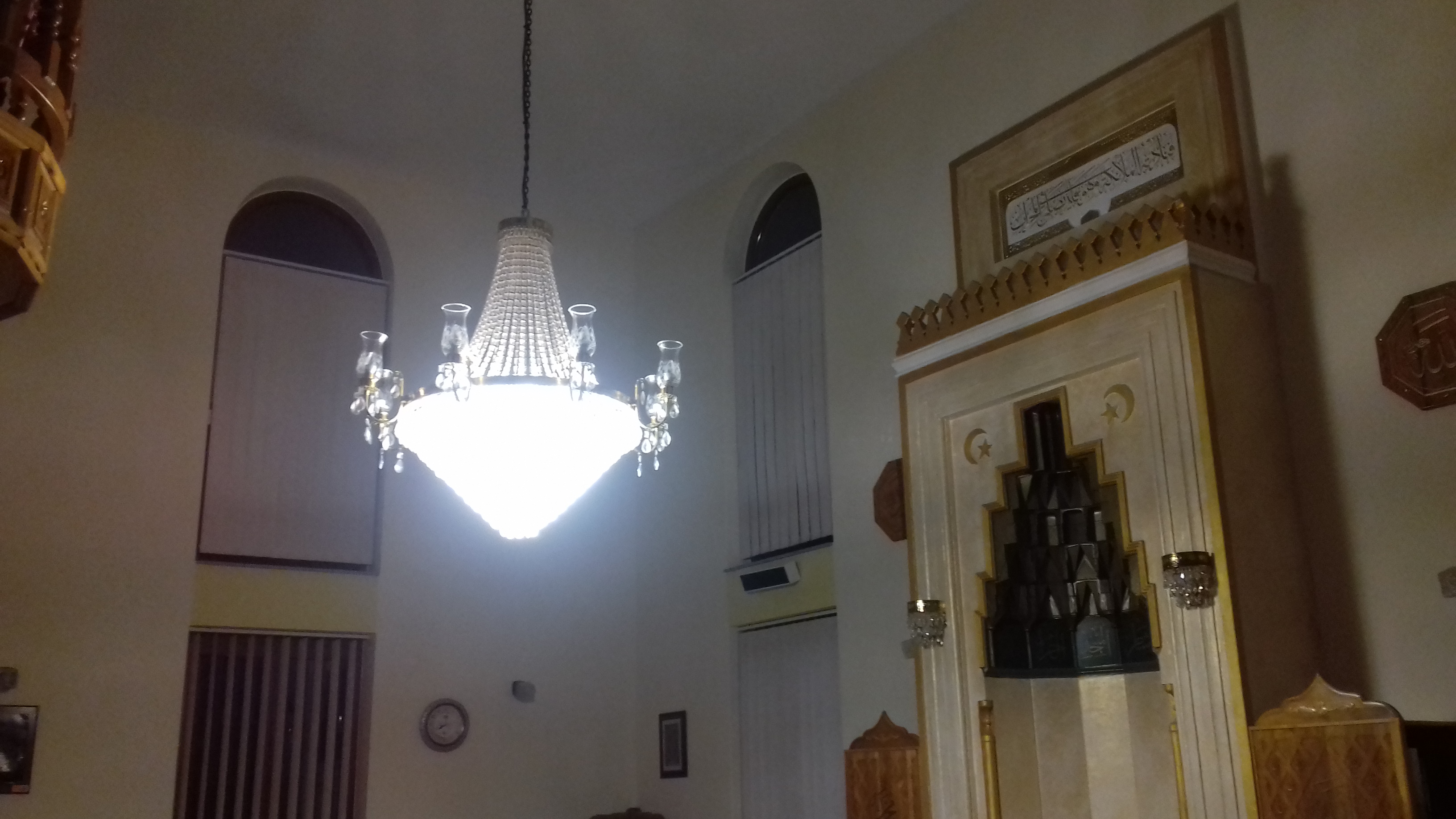 Džamija u Janjićima